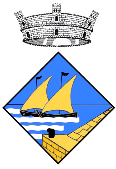 Blason (escut) de Portbou